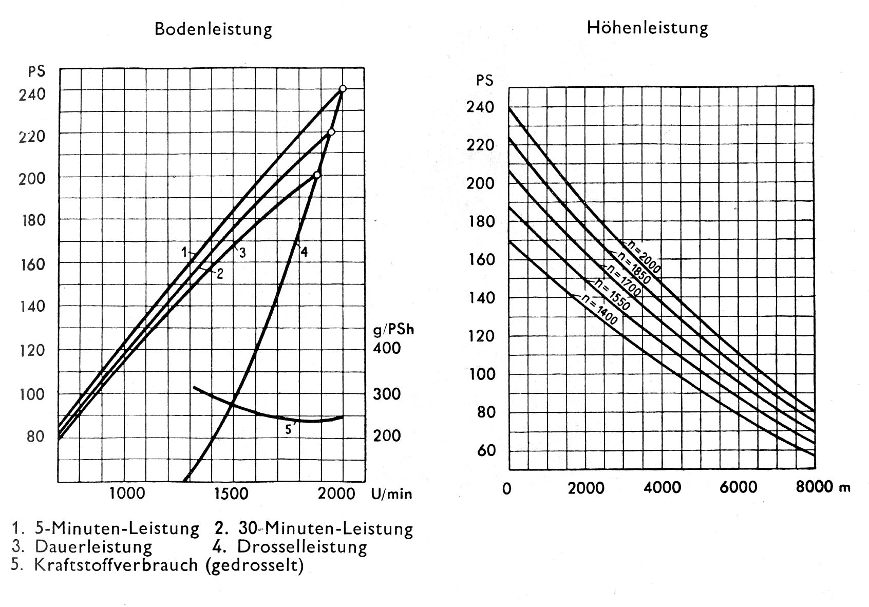 Diagramme für den Argus As 10